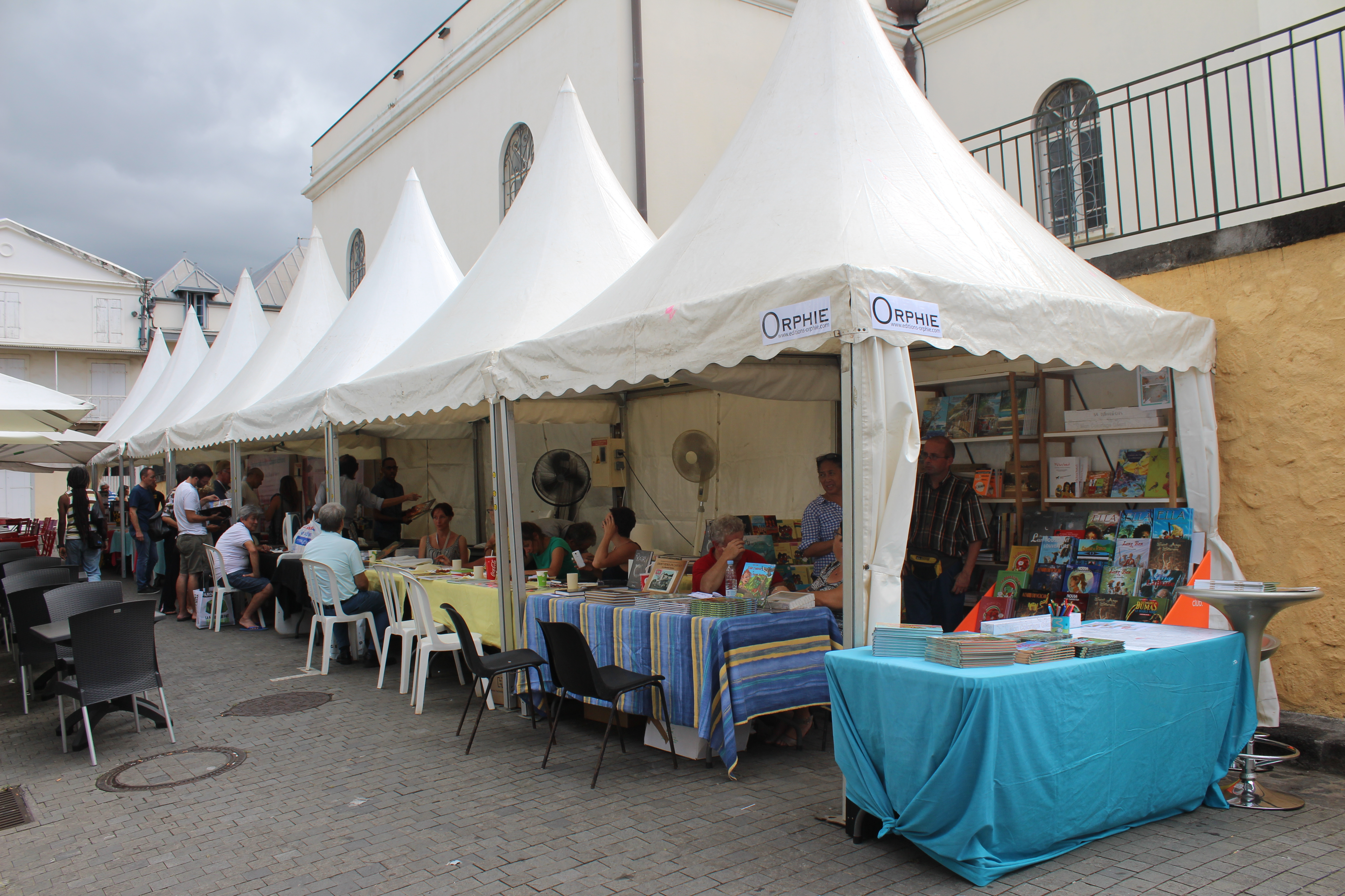 Vue des installations du Cyclone BD 2015.